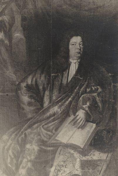 Foto von Johan Clant